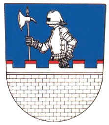 Znak obce Březno v okrese Chomutov